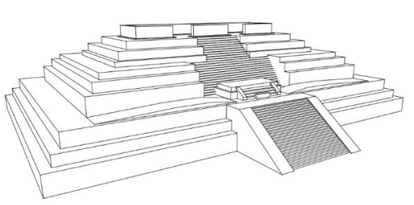 Perspectiva